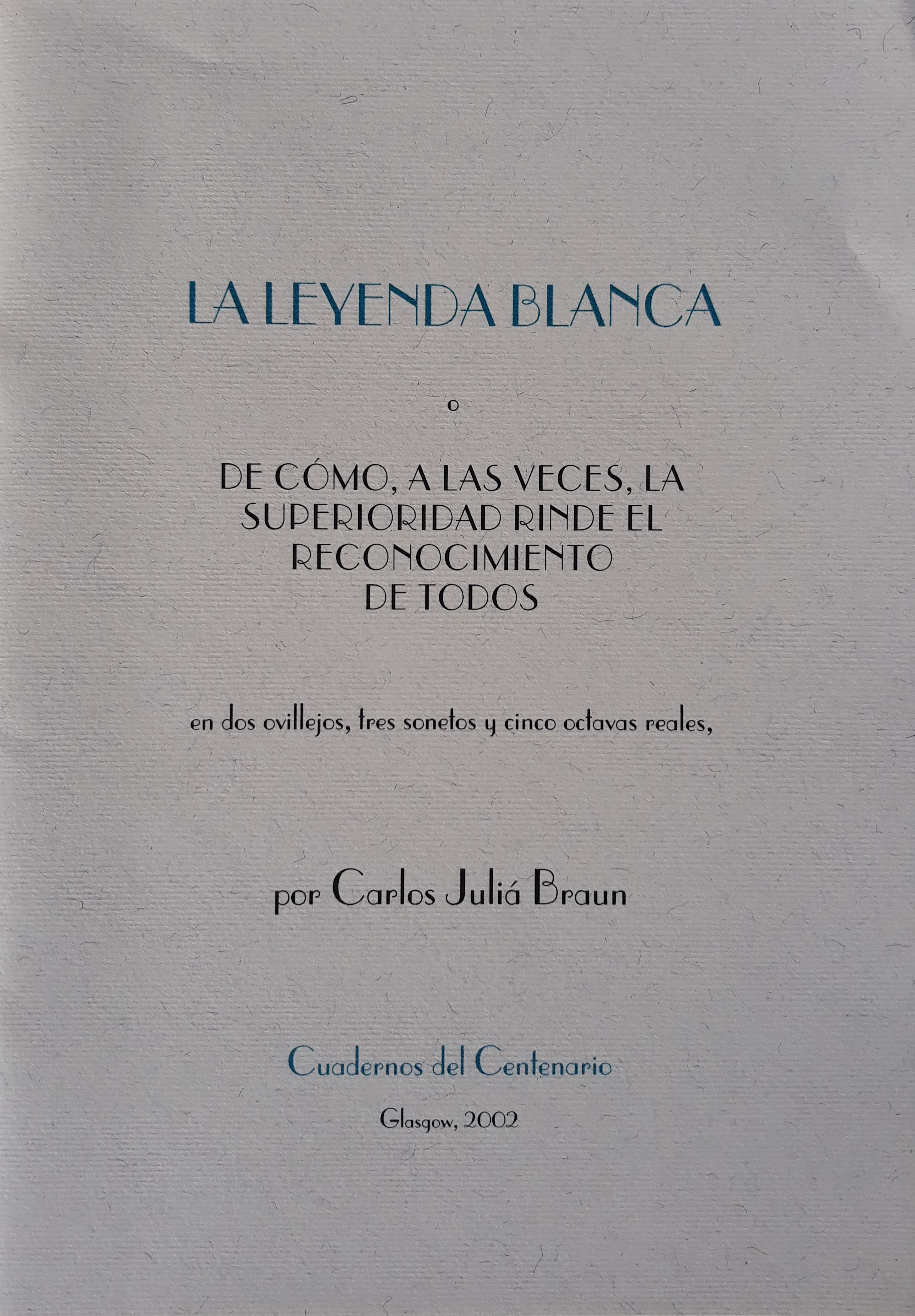 'La leyenda blanca', por Carlos Julià Braun (2002), poemario satírico